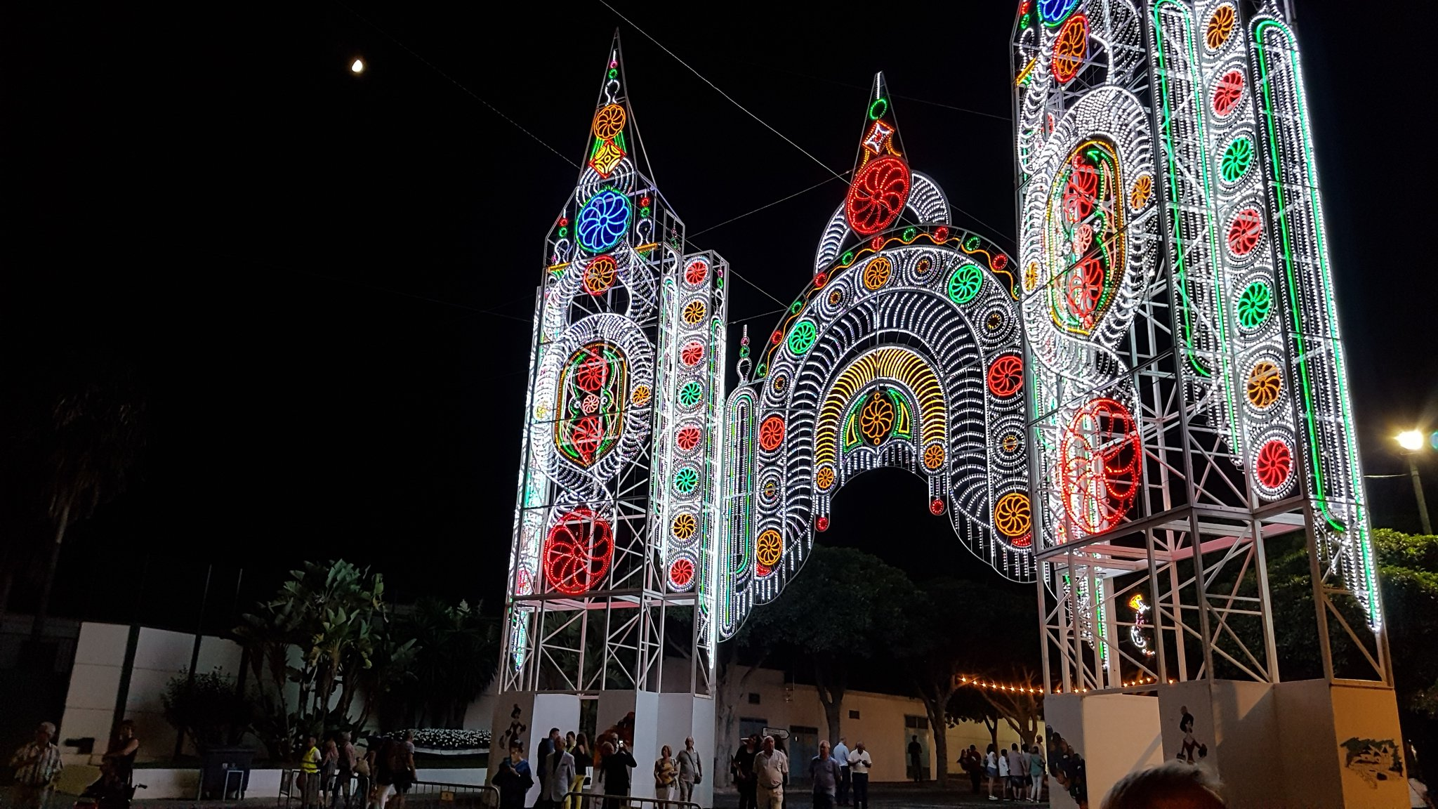 Feria Torremolinos, 2017